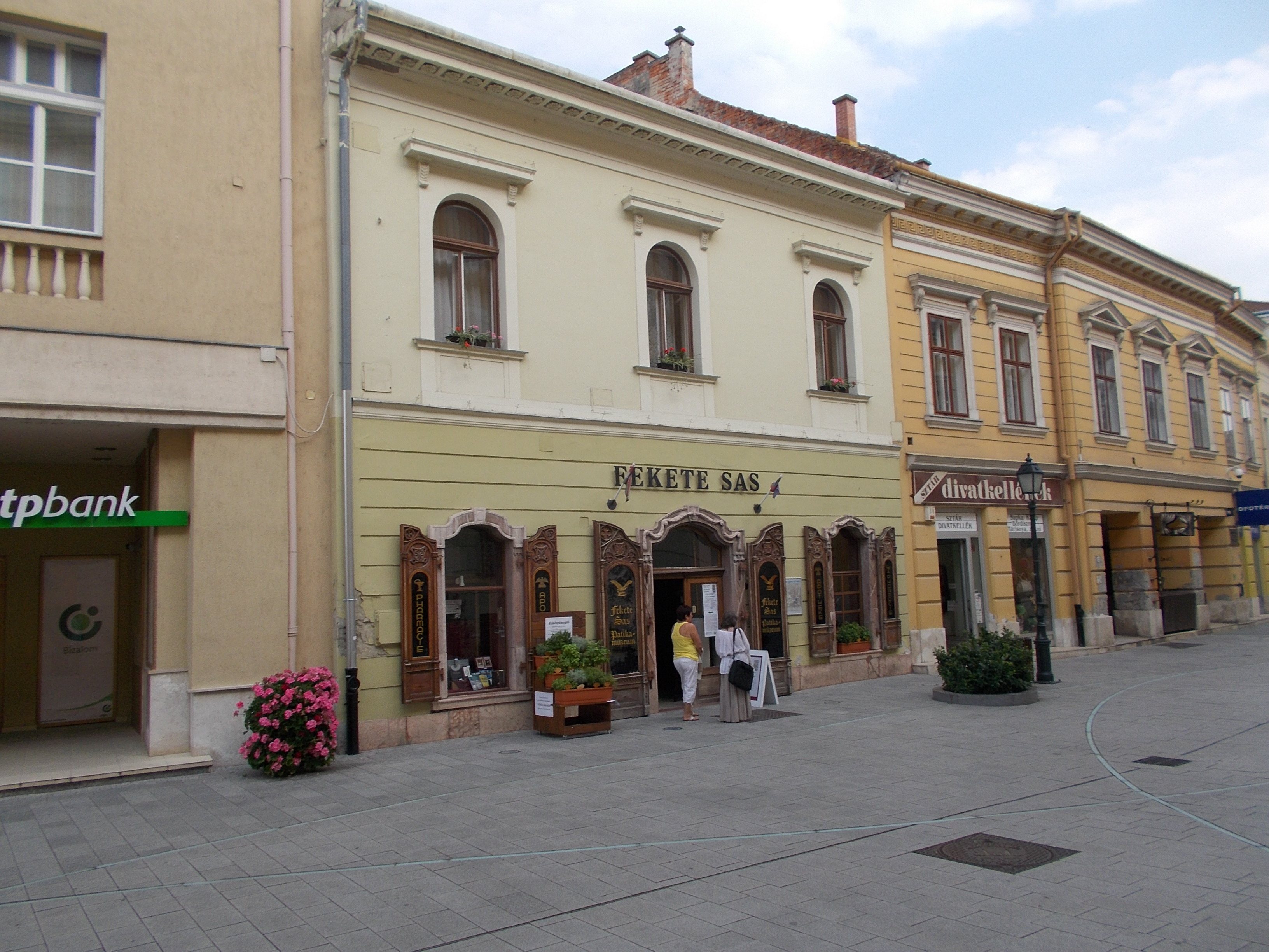 Fekete Sas Patikamúzeum. (É) Műemlék ID 3827. Lakások és múzeum, egykori Fekete Sas patika, barokk, 18. század. - Magyarország, Fejér megye, Székesfehérvár, Belváros, Fő utca 5. This is a photo of a monument in Hungary, Identifier: 3827